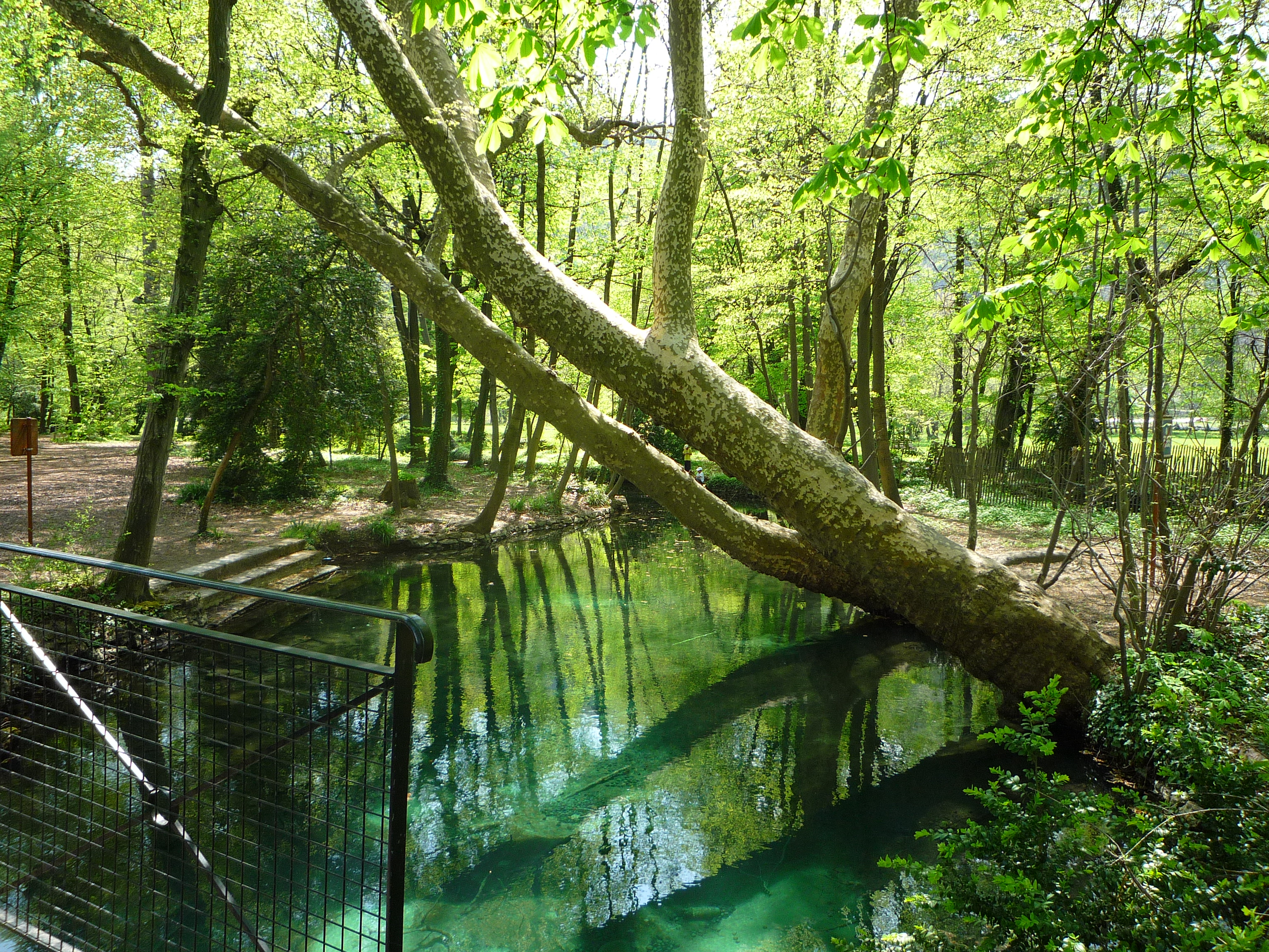 L'arbre penché dans le parc de la Poya - Fontaine (Isère)